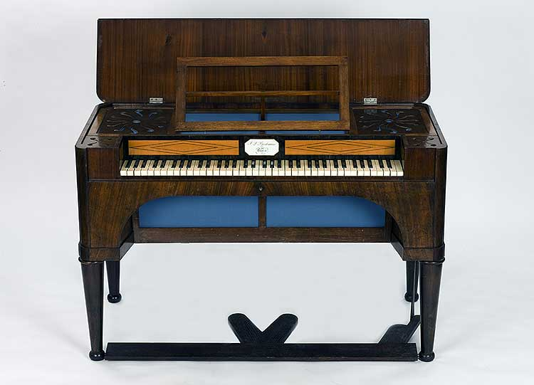 Terpodion Johann David Buschmann (1773-1852) Um 1825 Berlin Signatur „J.D. Buschmann in Berlin“ Klaviaturumfang: F1-f4 (sechs Oktaven) Restaurierung 2006 / 07: Andreas Hermert / Meike Wolters H 830 mm, B 1296 mm, T 666 mm Inv.-Nr.: V/J 417